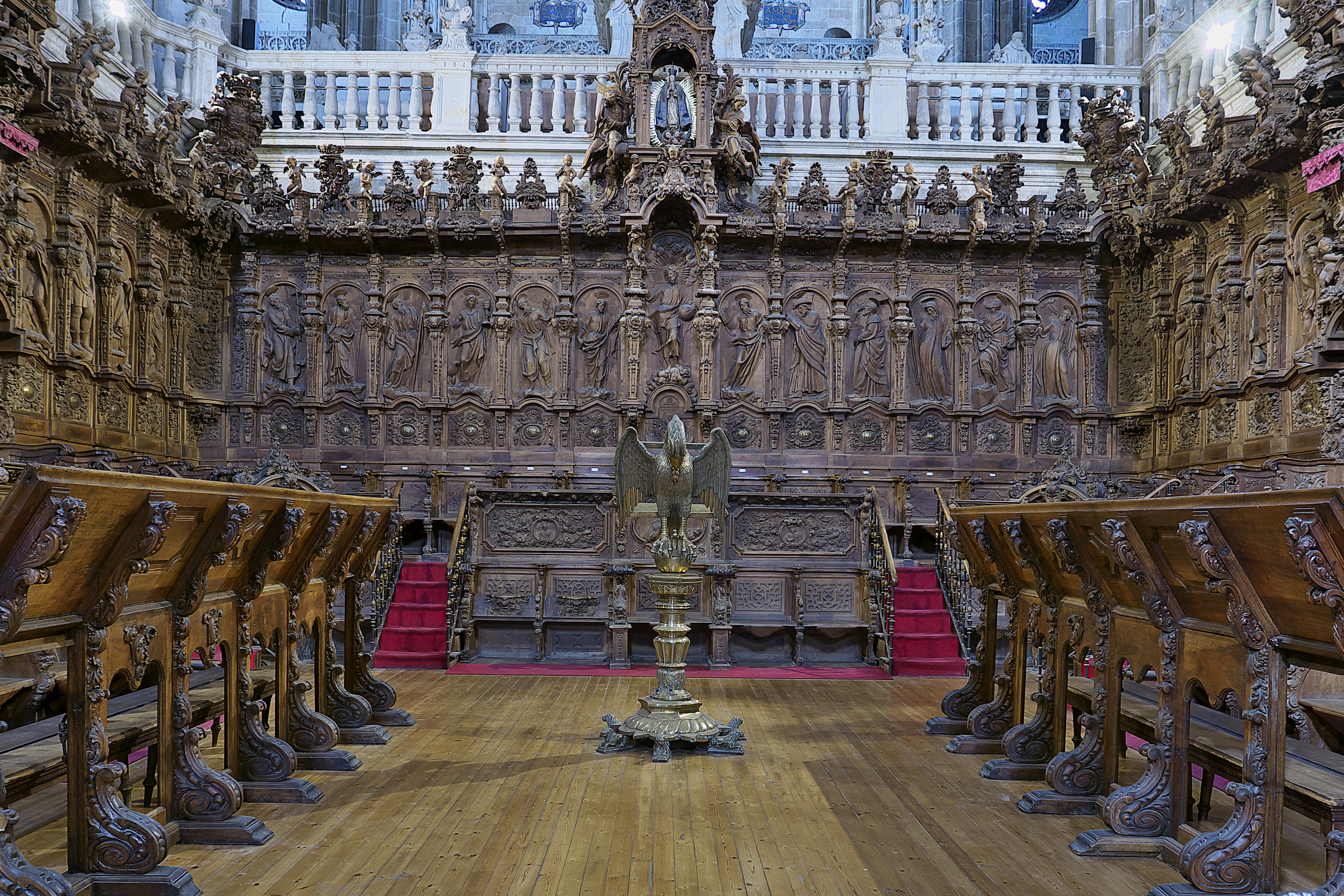 Proyectado por Joaquín de Churriguera y su hermano Alberto (1710-1733). La escultura es de José de Larra y Alejandro Carnicero.